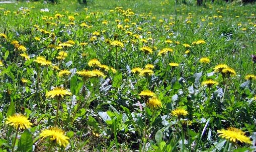 maslačak u mom travnjaku